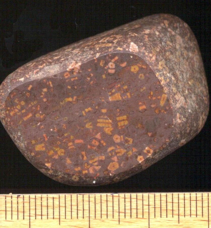 Kalkstein mit Crinoiden; eiszeitliches Geschiebe; Zickersches Höft auf Rügen